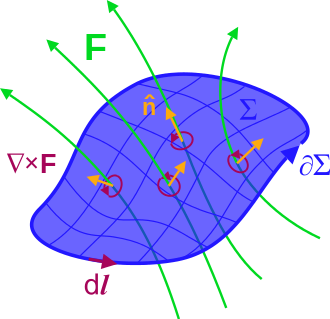 ಕನ್ನಡ: ಮುಚ್ಚಿದ b ಯೊಂದಿಗೆ ಮೇಲ್ಮೈ ರೇಖೆಯ ಅವಿಭಾಜ್ಯಗಳು ಮತ್ತು ಸುರುಳಿಗಳು ಶಾಸ್ತ್ರೀಯ ದ್ರವ ಡೈನಾಮಿಕ್ಸ್‌ನಲ್ಲಿನ ಪ್ರಮಾಣಗಳಿಗೆ ಹೋಲುತ್ತವೆ: ಒಂದು ದ್ರವದ ಪರಿಚಲನೆಯು ಮುಚ್ಚಿದ ಲೂಪ್‌ನ ಸುತ್ತಲೂ ದ್ರವದ ಹರಿವಿನ ವೇಗ ಕ್ಷೇತ್ರದ ರೇಖೆಯ ಅವಿಭಾಜ್ಯವಾಗಿದೆ, ಮತ್ತು ದ್ರವದ ಸುಳಿವು ವೇಗದ ಸುರುಳಿಯಾಗಿದೆ. ಎಫ್ ಇ ಅಥವಾ ಬಿ ಕ್ಷೇತ್ರಗಳಾಗಿರಬಹುದು. ಮತ್ತೆ, n ಯುನಿಟ್ ಸಾಮಾನ್ಯವಾಗಿದೆ. (ವೆಕ್ಟರ್ ಕ್ಷೇತ್ರದ ಸುರುಳಿ ಅಕ್ಷರಶಃ "ಪ್ರಸರಣಗಳು" ನಂತೆ ಕಾಣುವುದಿಲ್ಲ, ಇದು ಹ್ಯೂರಿಸ್ಟಿಕ್ ಚಿತ್ರಣವಾಗಿದೆ.)